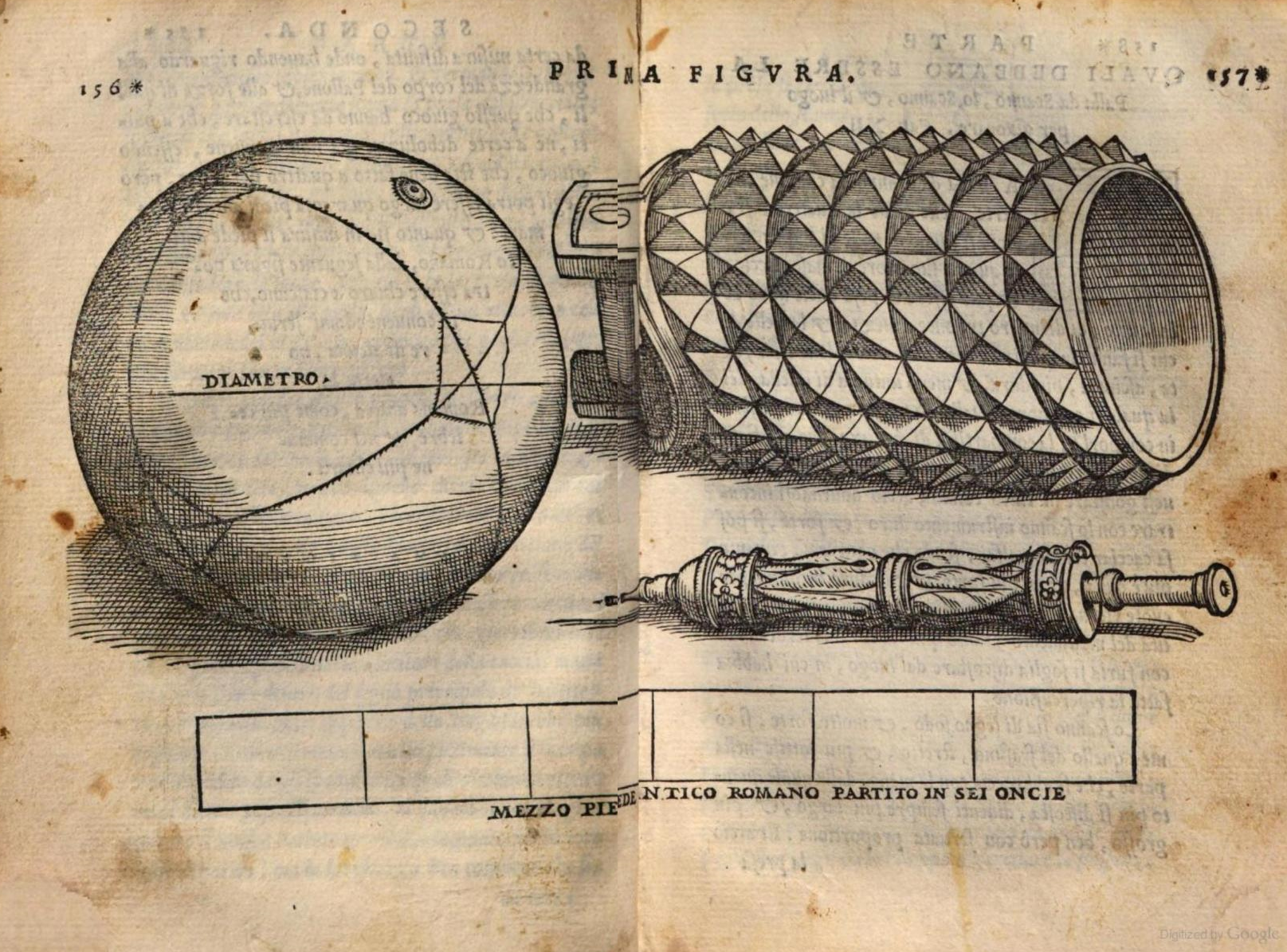 Ballon et Brassard pour le jeu de ballon - Trattato del giuoco della palla di messer par Antonio Scaino da Salò - date de publication : 1555 - il est indiqué que « il Pallone, … di diametro un piede Romamo » (le ballon a un diamètre de 1 pied romain antique - soit 29,6 cm) voir : the Internet Archive